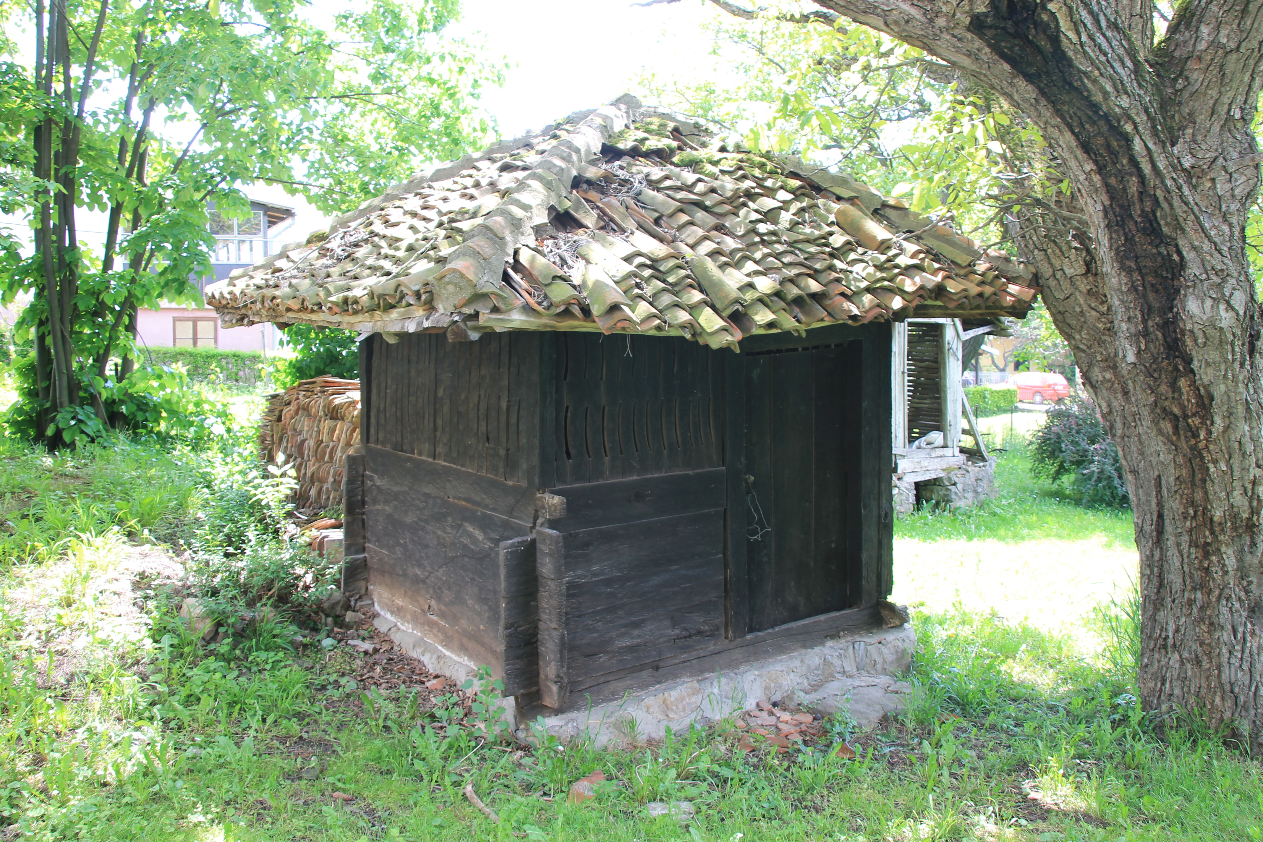 Okućnica Ilije Miloševića